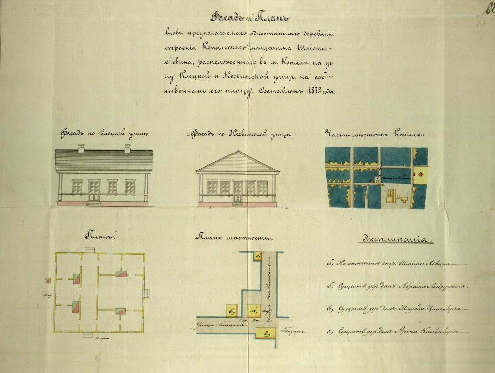 Беларуская (тарашкевіца): Капыль (Kapyl), вуліца Нясьвіская (vulica Niaśviskaja)